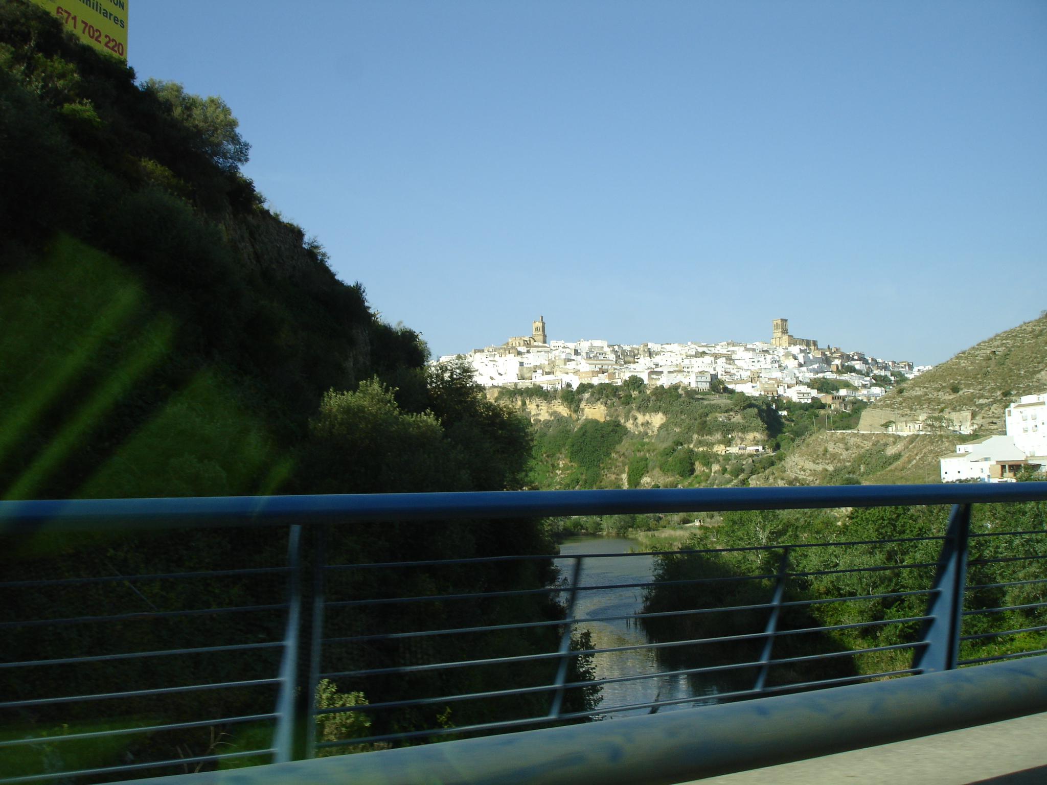 Arcos desde la carretera sobre la presa del lago